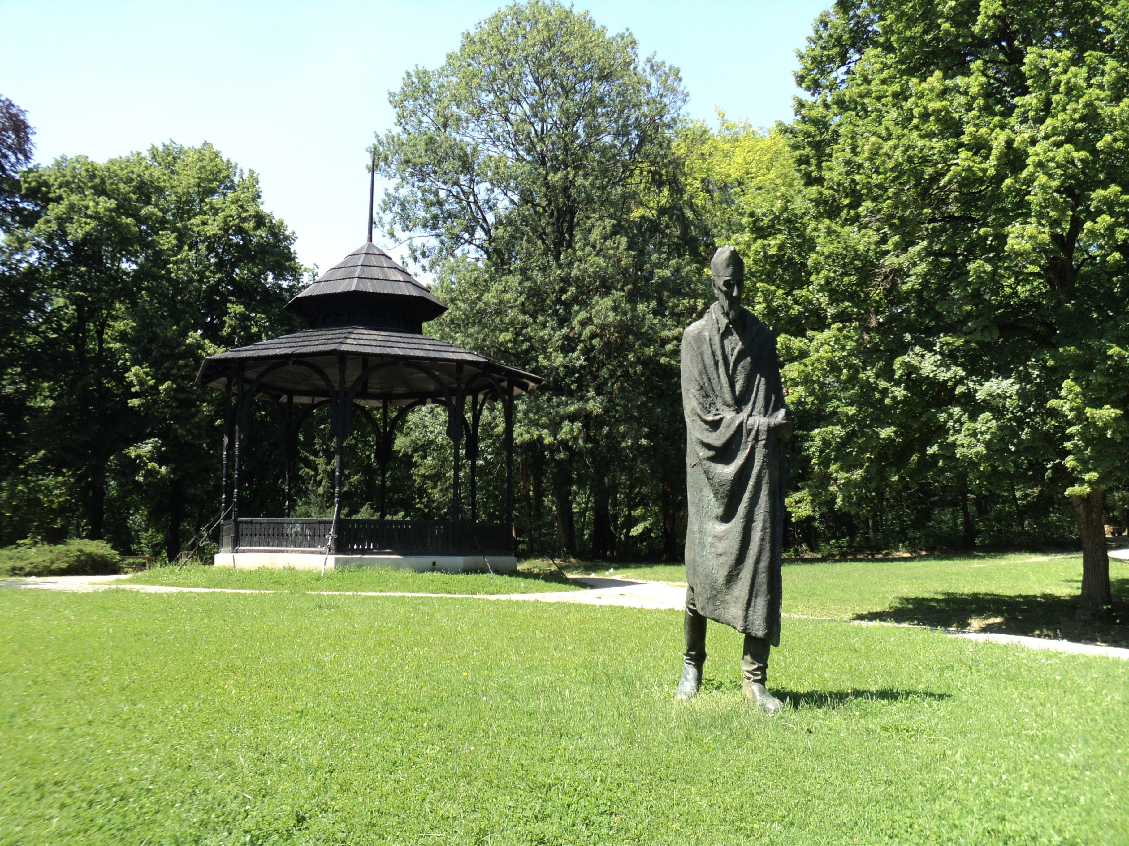 Park Tuškanac, južni dio - psaviljon i spomenik Vladimiru Nazoru, Zagreb.